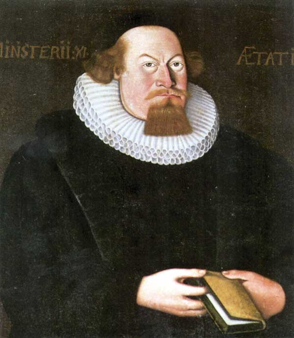 Påstått portrett av Petter Dass (1647-1707) i Melhus kirke.